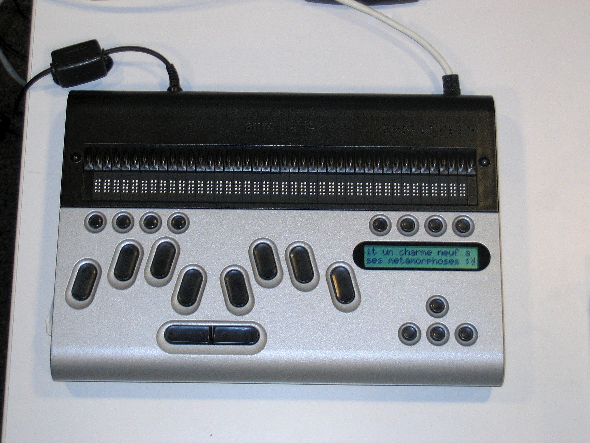 Plage Braille avec touches spéciales (marque EuroBraille). Cette plage braille est en plus munie d'un ordinateur embarqué, et peut donc fonctionner de manière autonome.